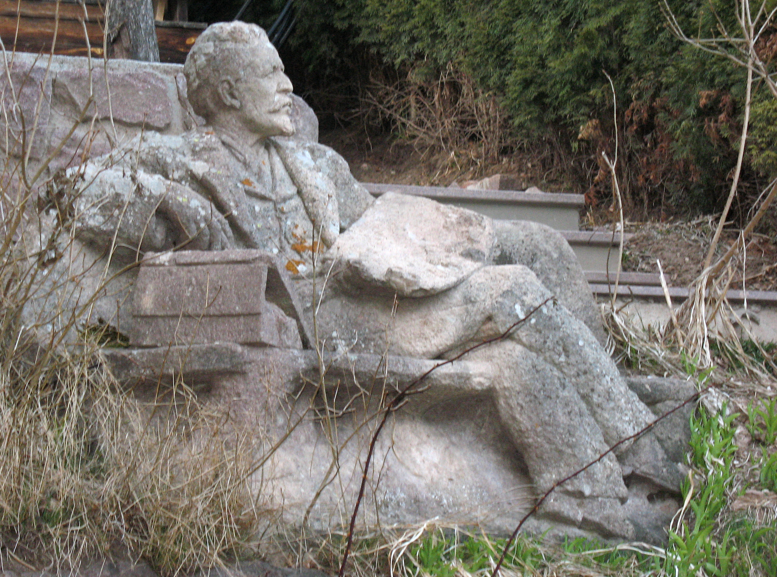 Monument to Josef Moroder-Lusenberg by Sculptor Johann Baptist Moroder-Lusenberg (1870 – 1932) in St. Ulrich in Gröden - Ortisei Val Gardena